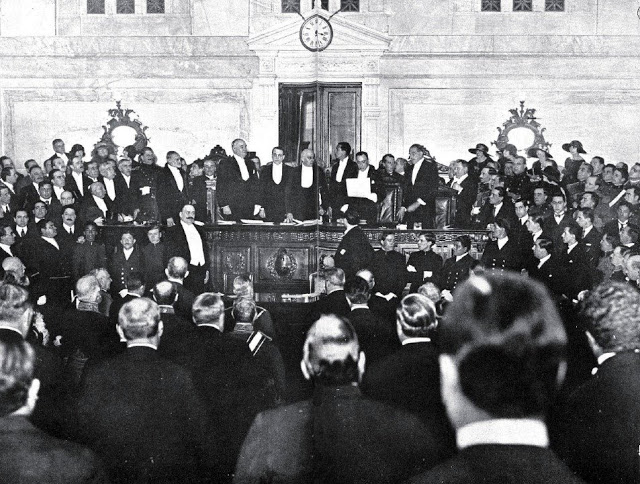 El presidente Marcelo T. de Alvear asume la presidencia el 12 de octubre de 1922.